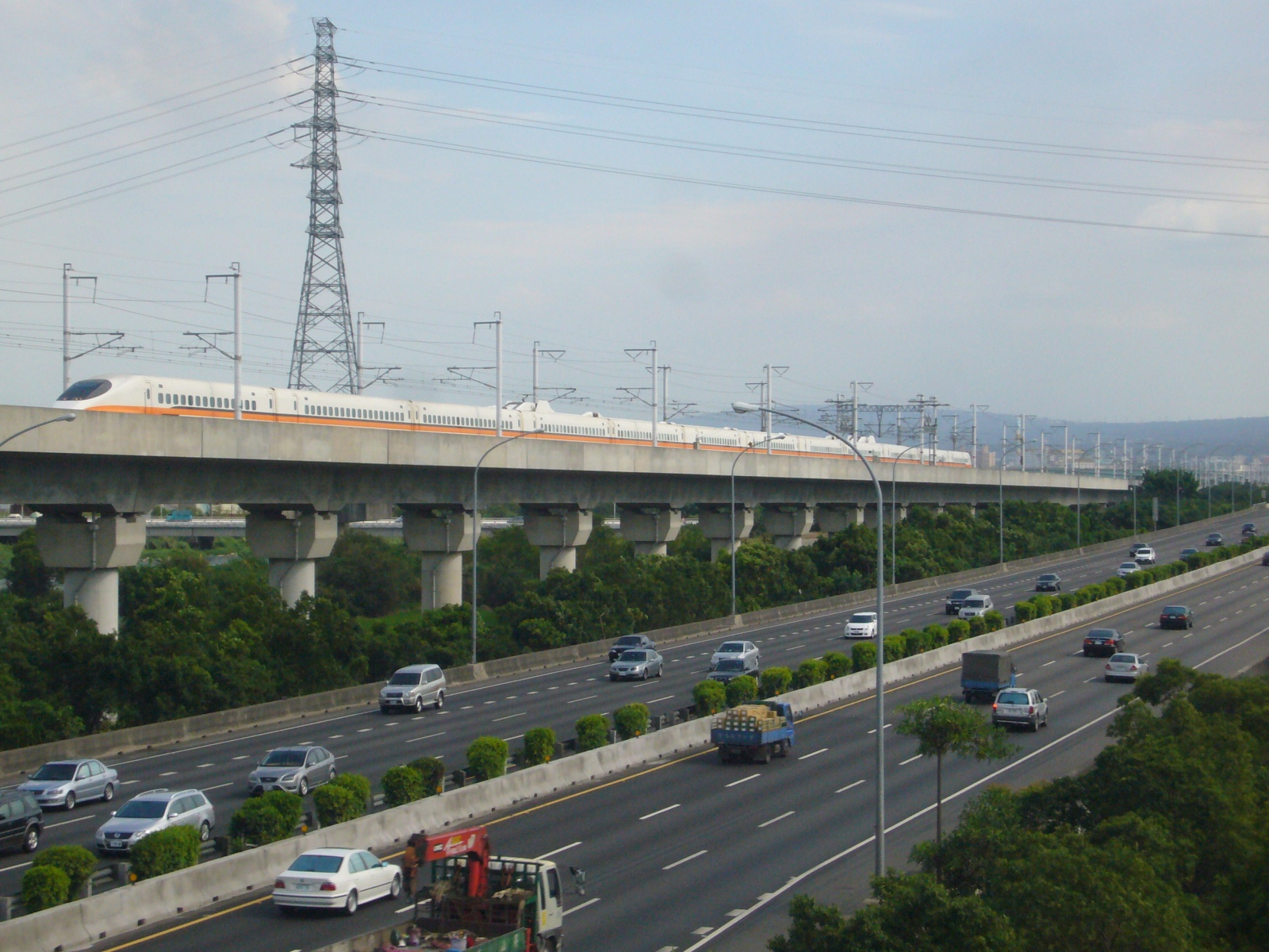 中文（台灣）: 台灣高鐵448次列車，高鐵台中站北。